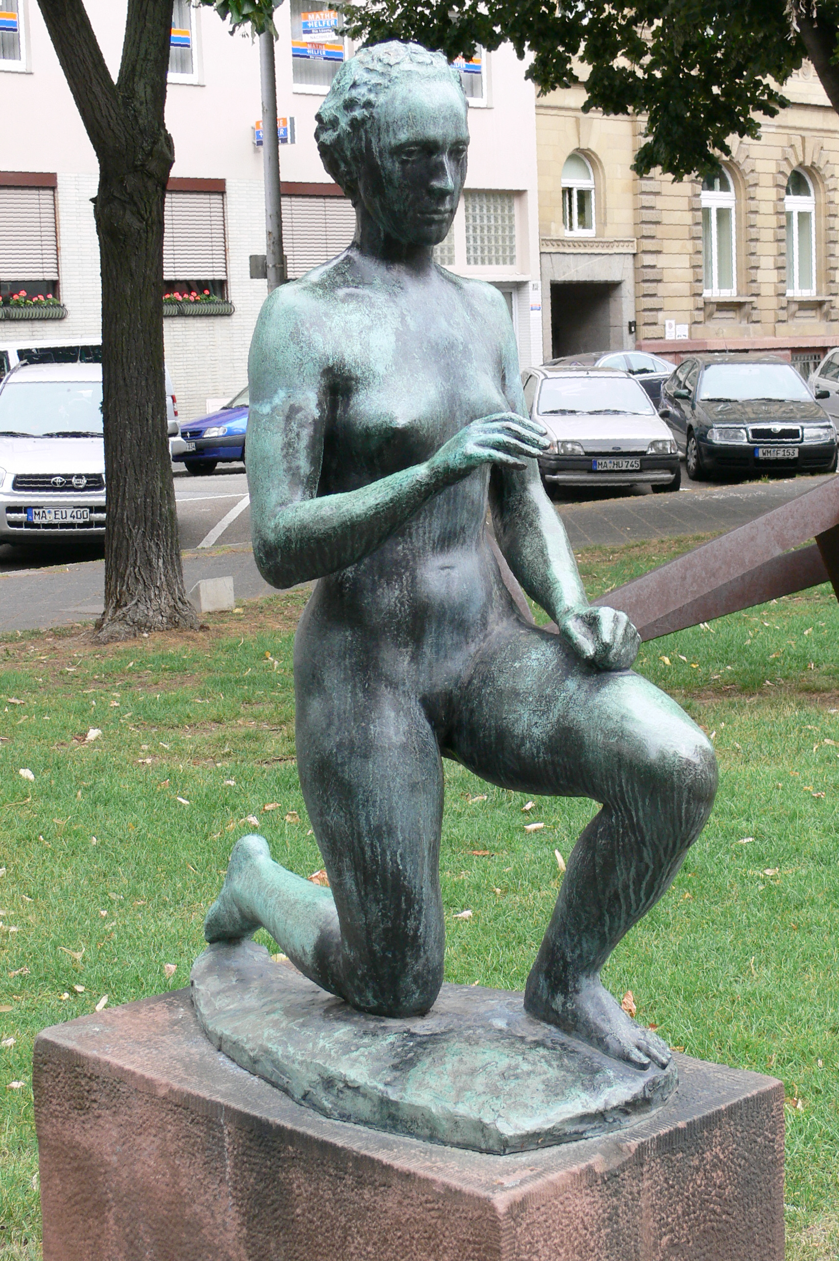 Kunsthalle Mannheim Skulpturengarten, Richard Scheibe: „Die Morgenröte“, Bronze, 1937